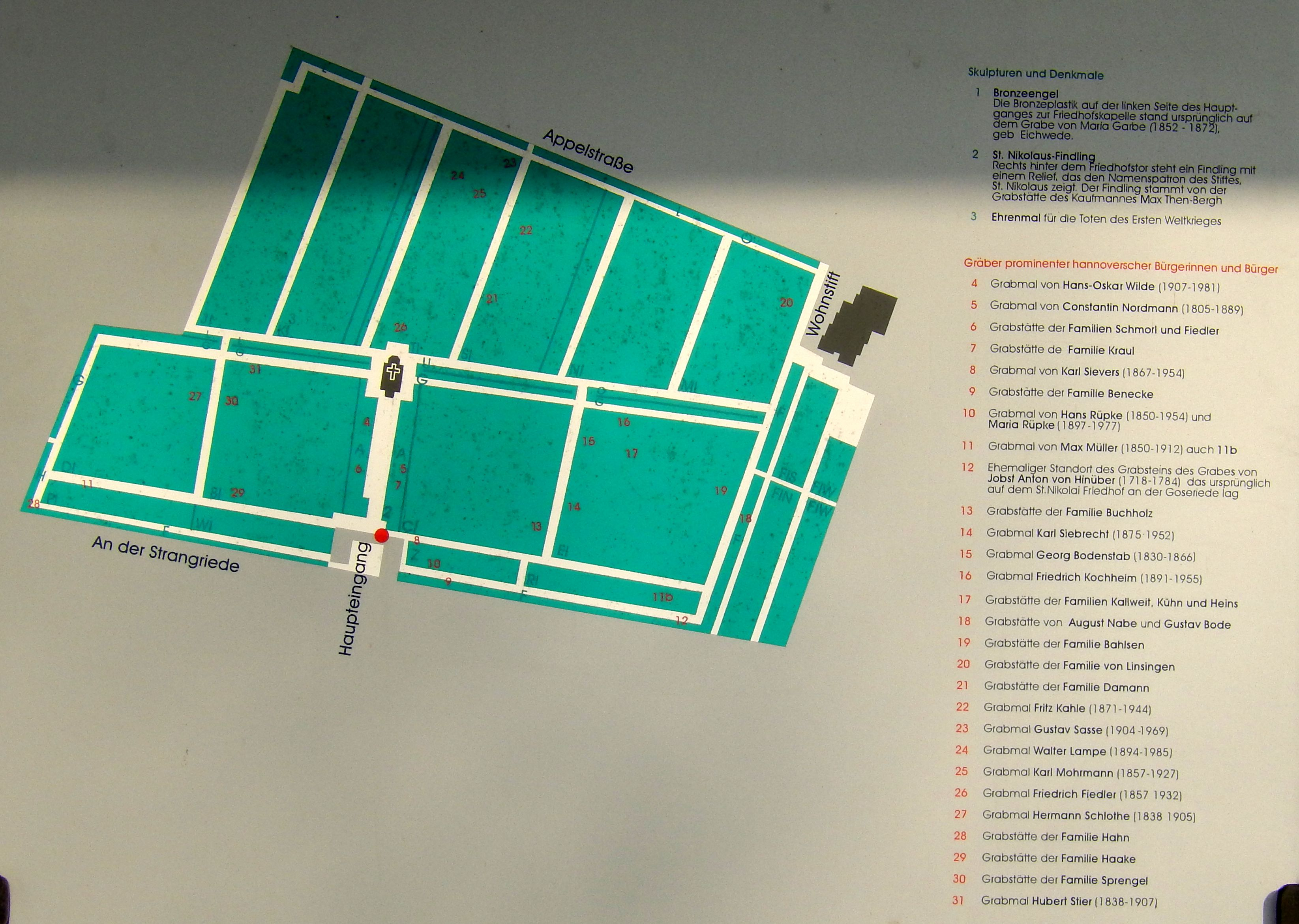 Infotafel Gräber prominenter hannoverscher Bürger auf dem Neuen St.-Nikolai-Friedhof in Hannover.